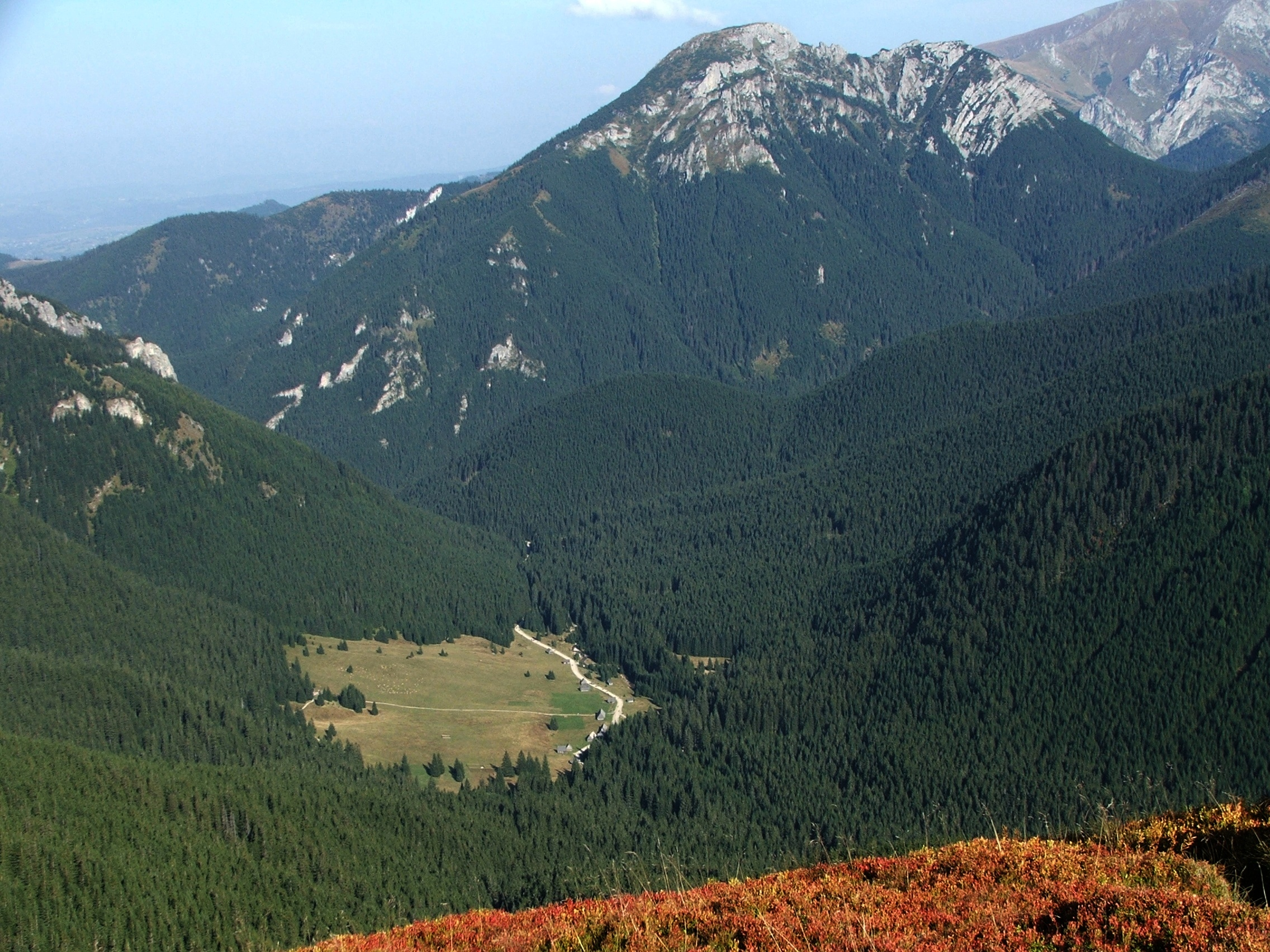 Widok z Grzesia na Kominiarski Wierch, Dolinę Chochołowską i Polanę Chochołowską